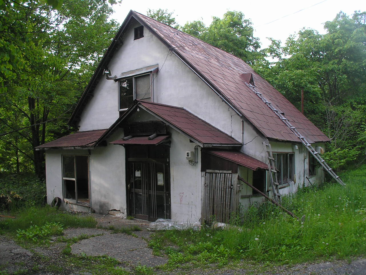 元風間 健介邸 夕張 （かざま けんすけ、1960年9月18日 -2017年6月17日頃）